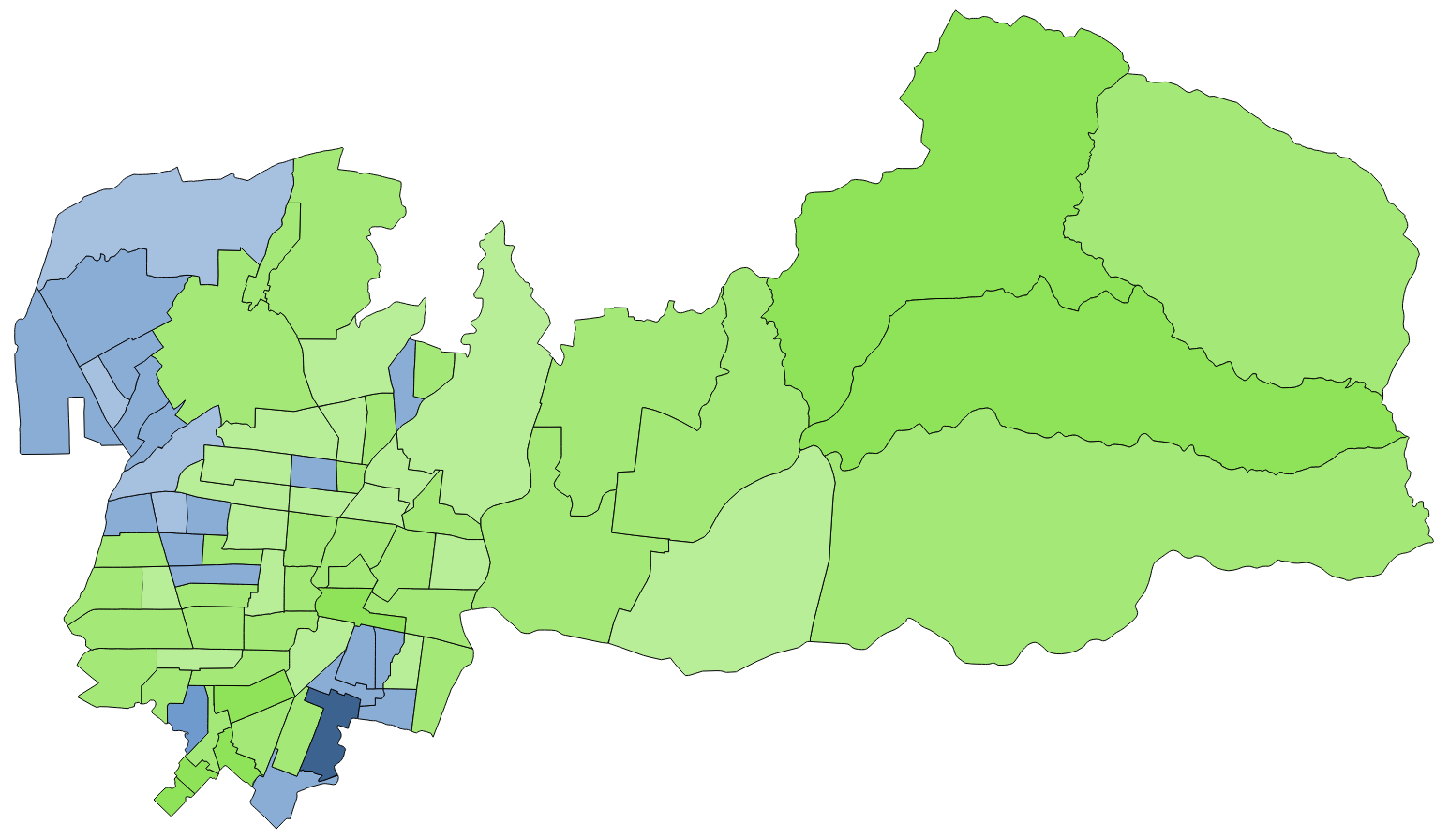 顏色對照表